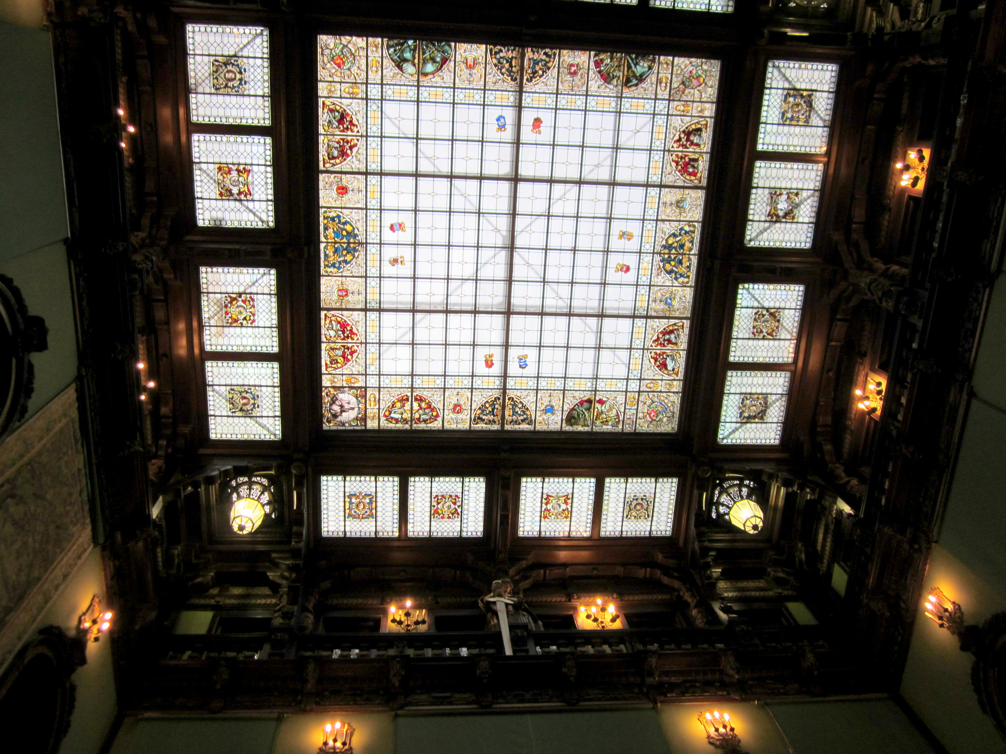 Ansamblul Castelului Peles. PH-II-a-A-16696